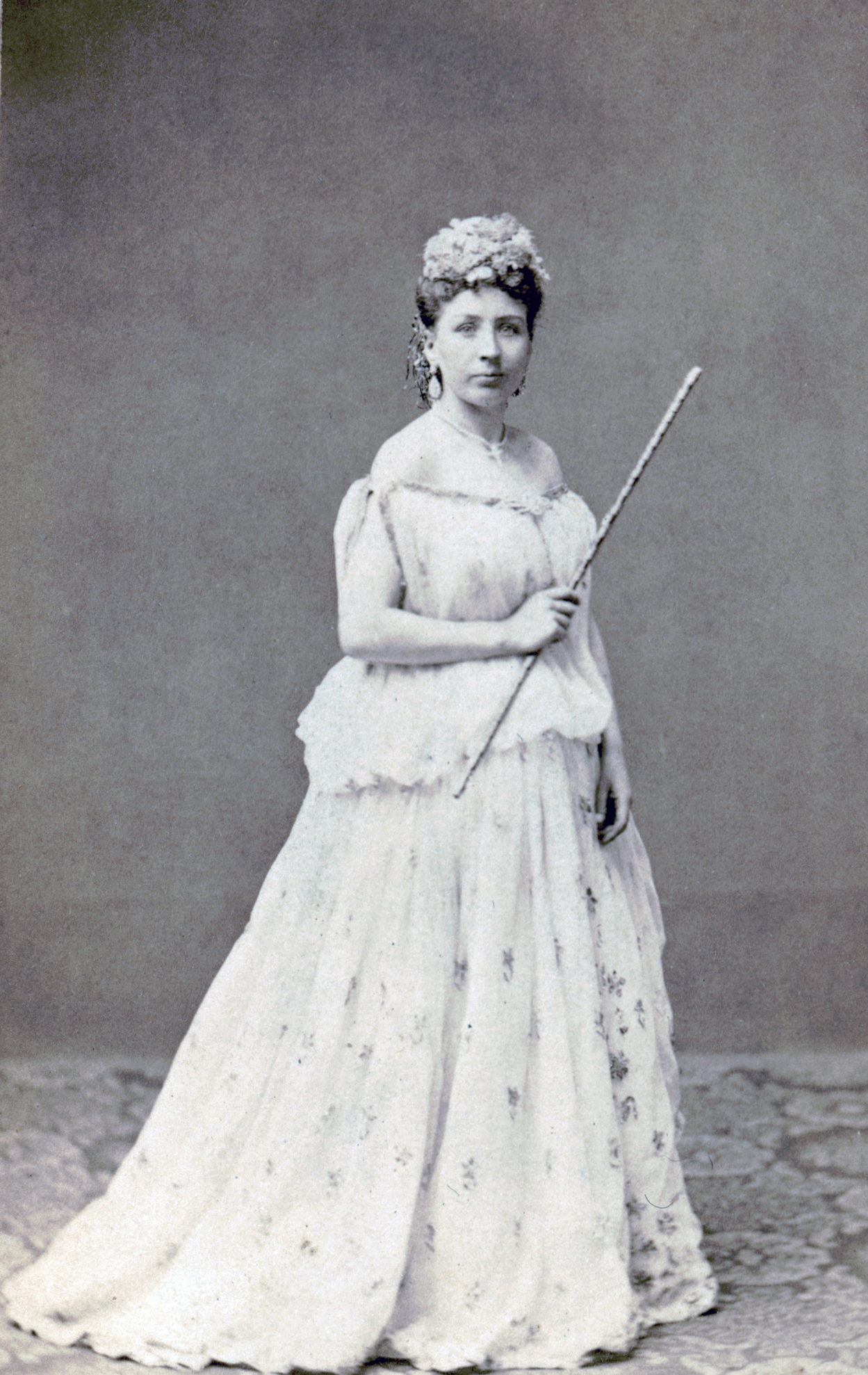 Hanna Tivander som Lyckans fé i Bockfoten, Manegeteatern på Djurgården, Constantin Rohdes sällskap 1866